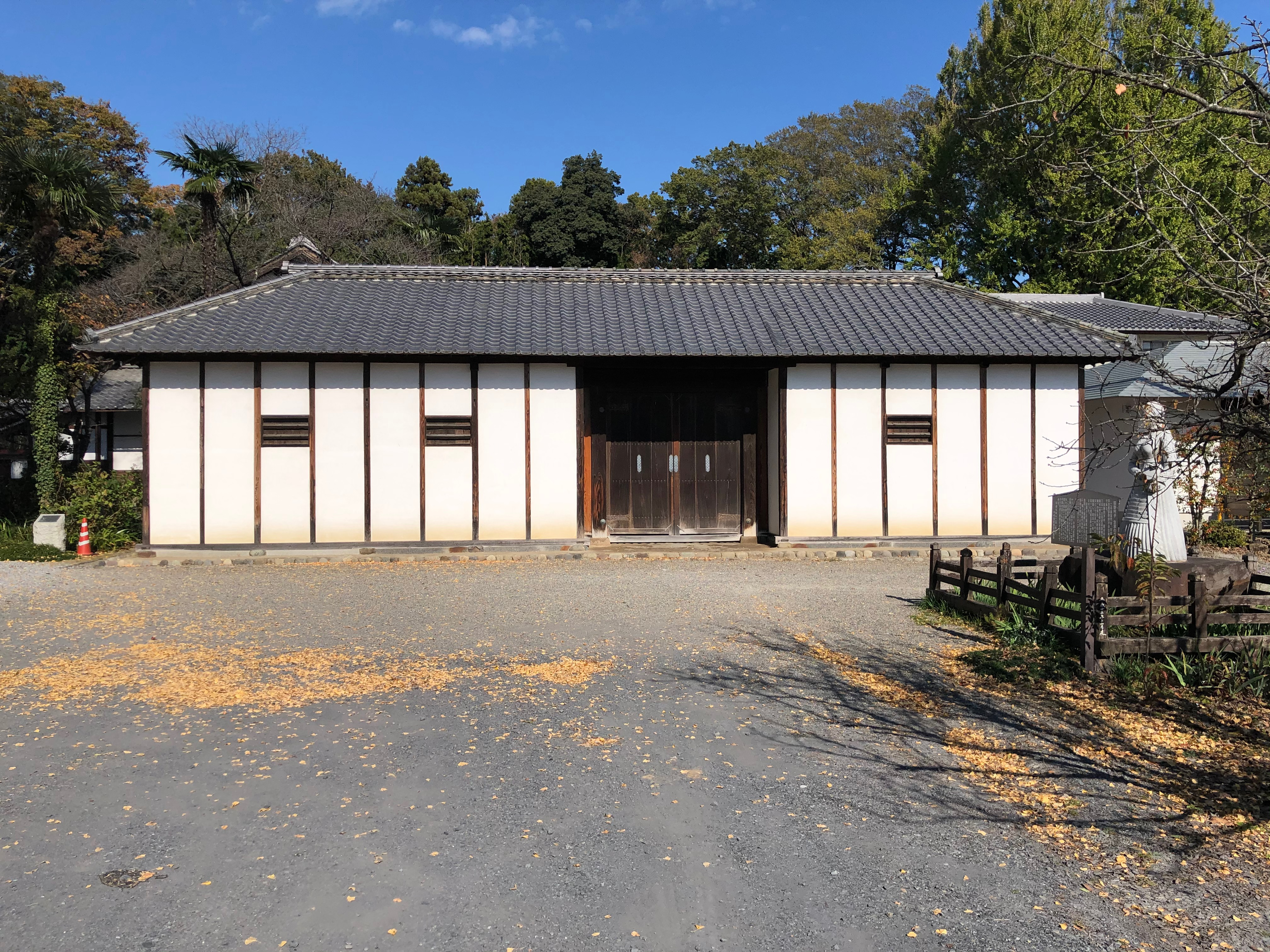 赤岩山光恩寺、荻野吟子生家長屋門